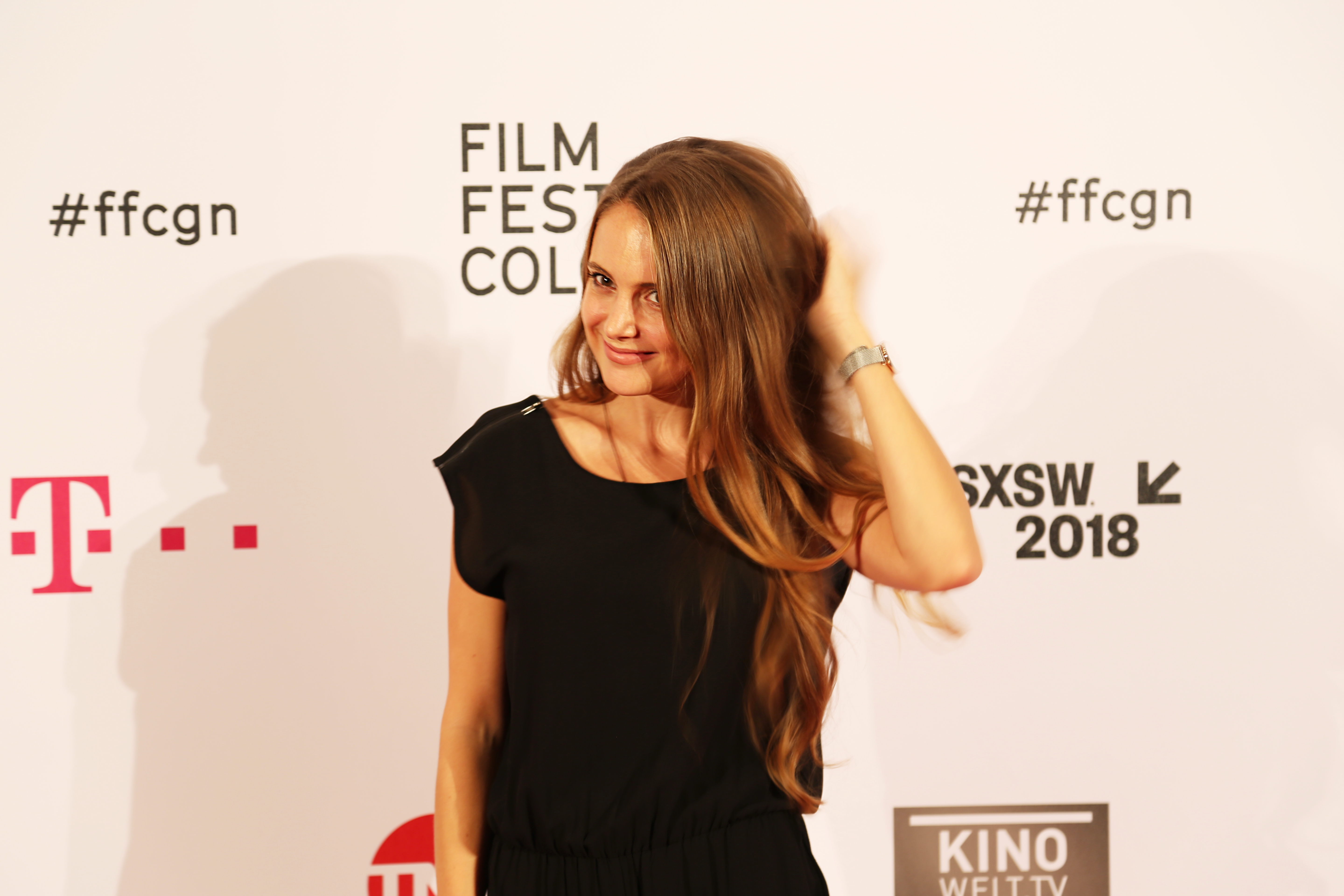 Katrin Wolter bei der Verleihung der "Film Festival Cologne Awards 2017".